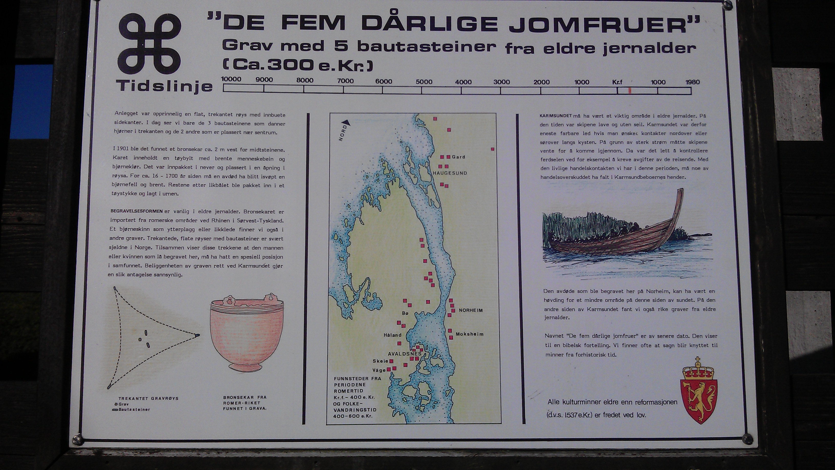 Informasjonstavle nær De fem dårlige jomfruer, rett under Karmsundsbrua på Haugesundssiden.